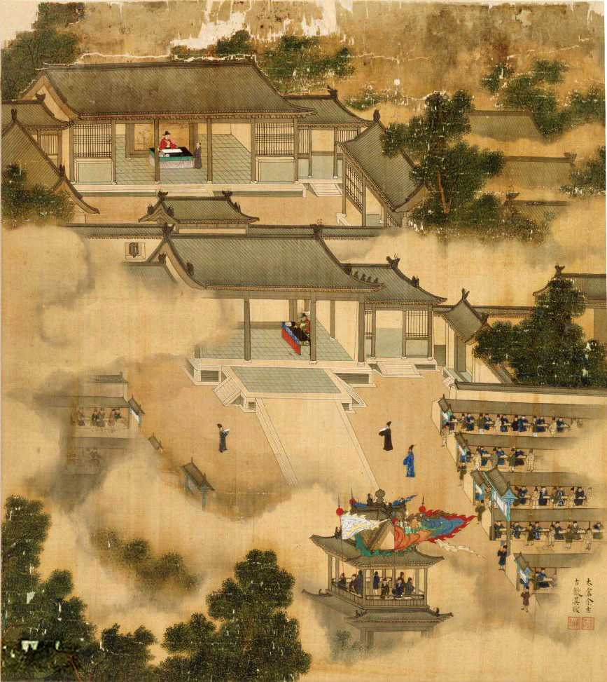 棘院秉衡，時年三十八至四十七